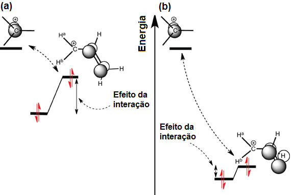 dger